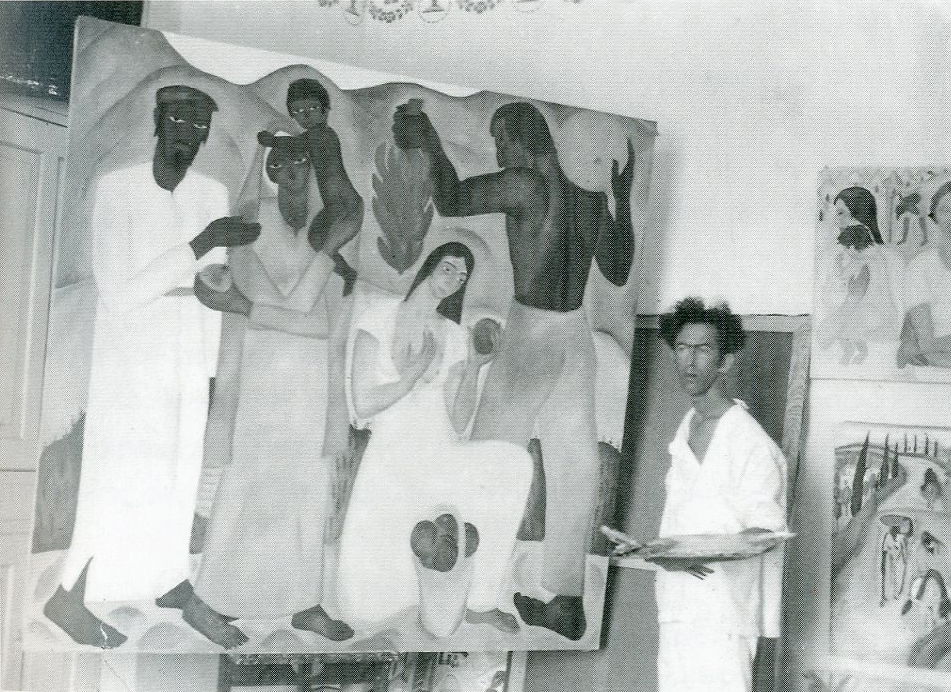 ראובן רובין עובד על הציור "פירות ראשונים" (1923)